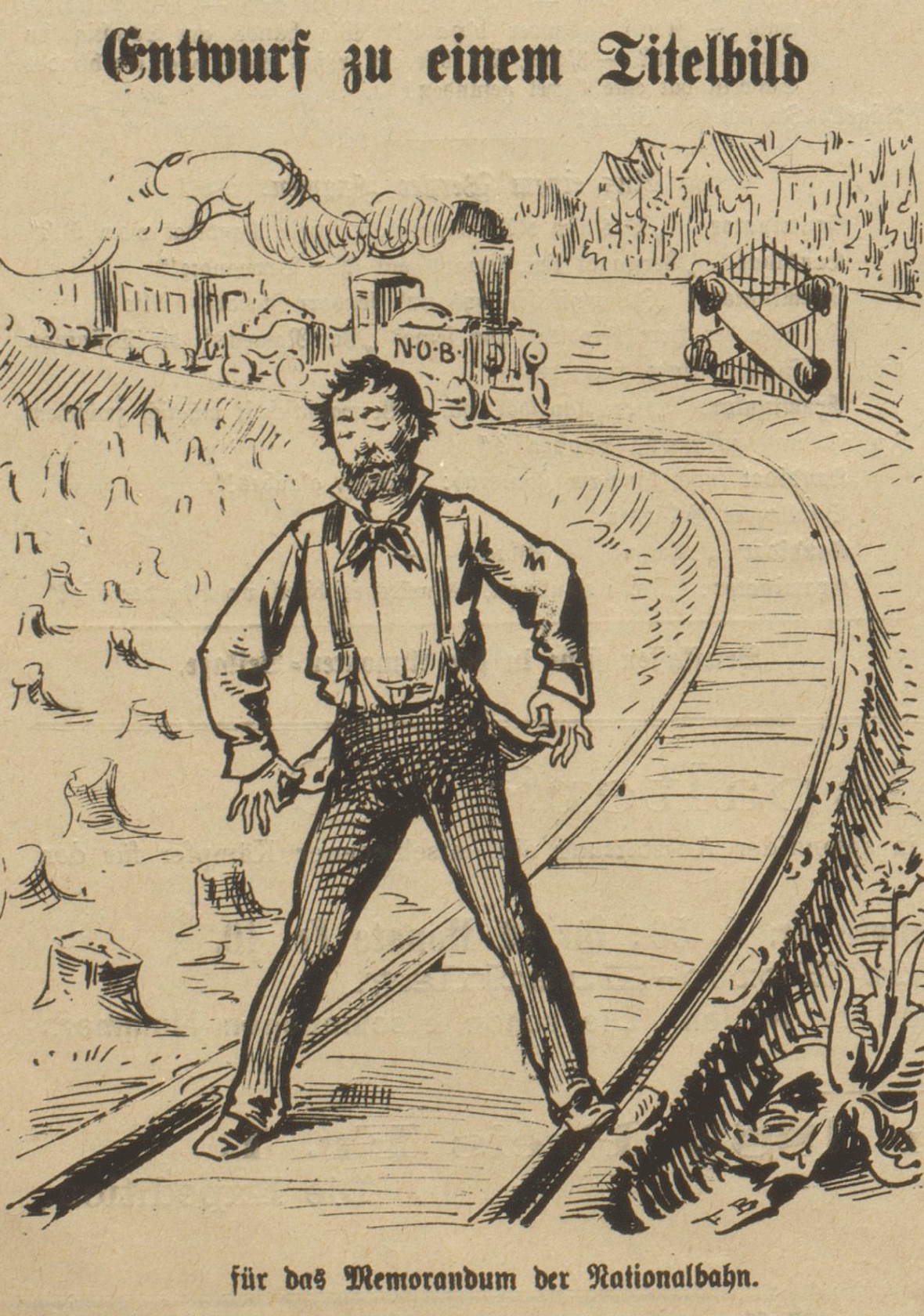 Karikatur des Nebelspalters zum Konkursverfahren der Schweizerischen Nationalbahn